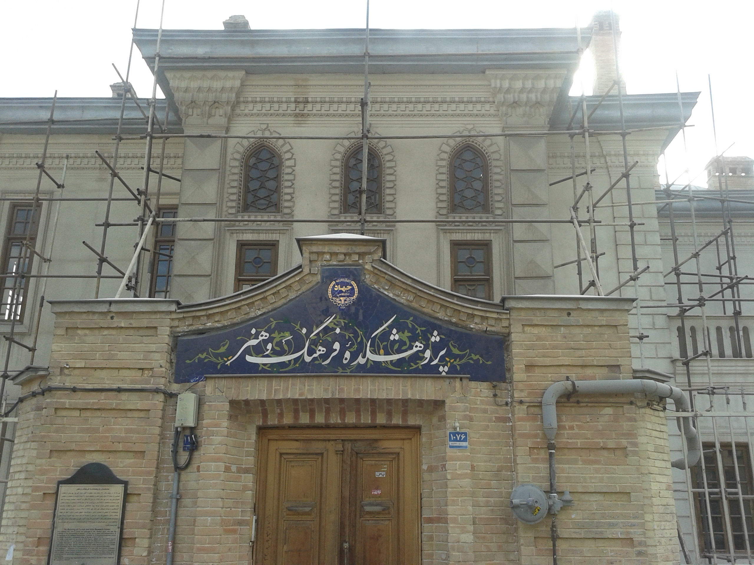 تصویر خانه رستم گیو در حال باز سازی